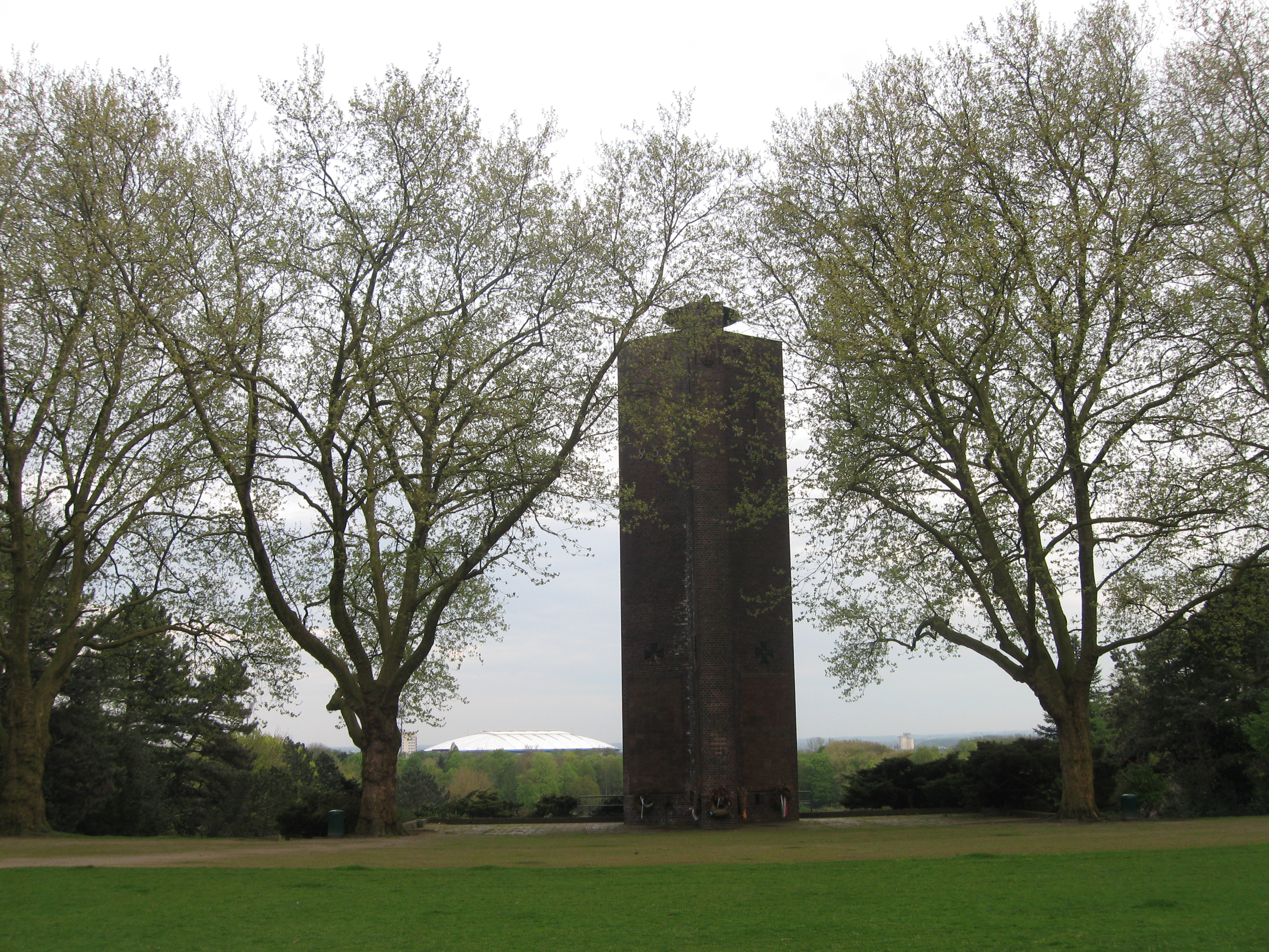 Das 1933/34 am Ufer des Berger Sees errichtete Ehrenmal in Gelsenkirchen-Buer ist heute ein Kriegerdenkmal für die Gefallenen beider Weltkriege. Im Hintergrund das Dach der Veltins-Arena.